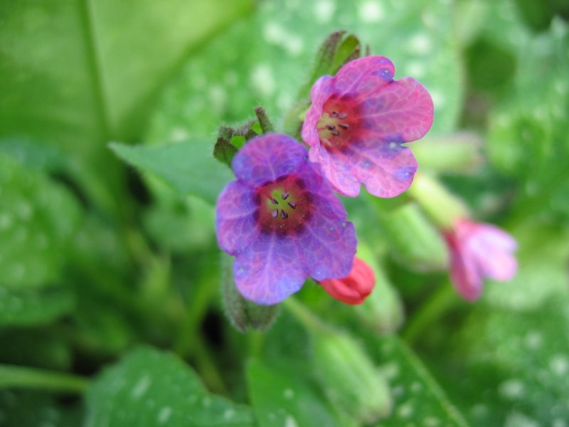 Blüte des Echten Lungenkrautes Pulmonaria officinalis